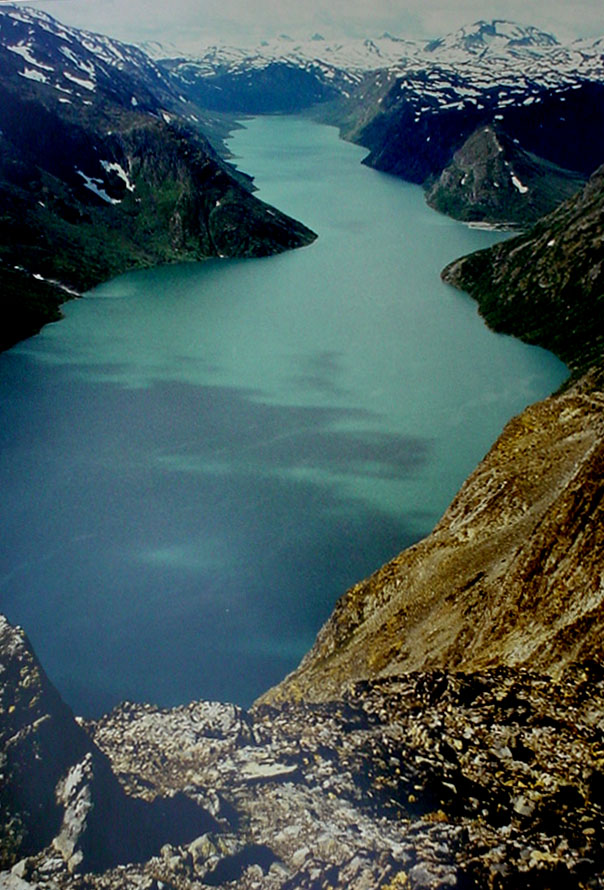 Gjendevatn fra Besseggen, Jotunheimen, Norge